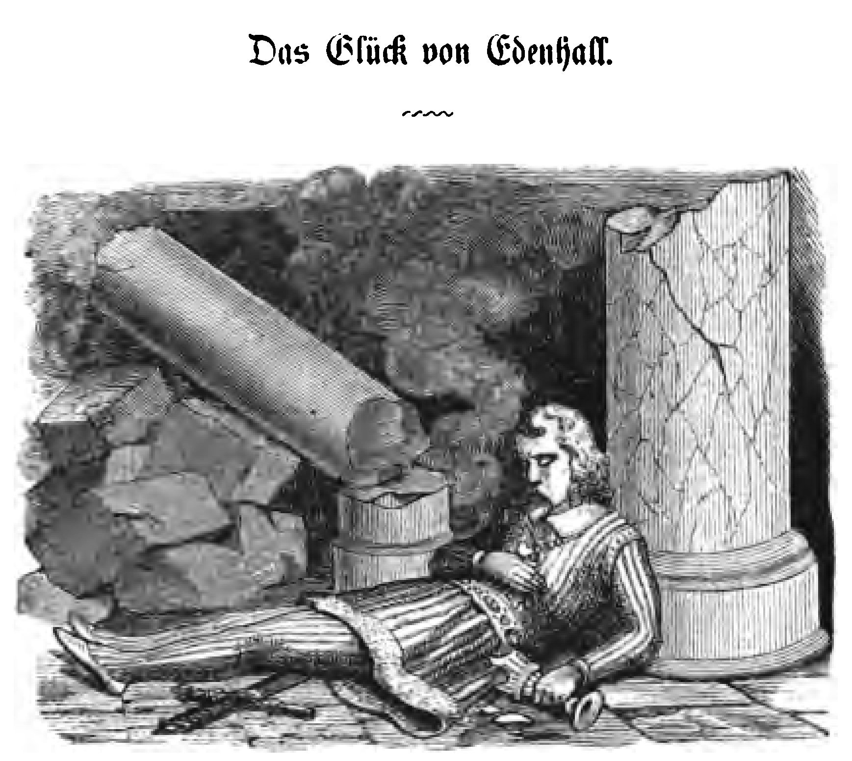 Das Glück von Edenhall. Aus: Balladenkranz aus deutschen Dichtern gesammelt. Herausgegeben von Gustav Wendt. Berlin: Grothe.